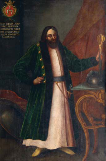 Беларуская (тарашкевіца): Партрэт Юрыя Храптовіча (Jury Chraptovič)